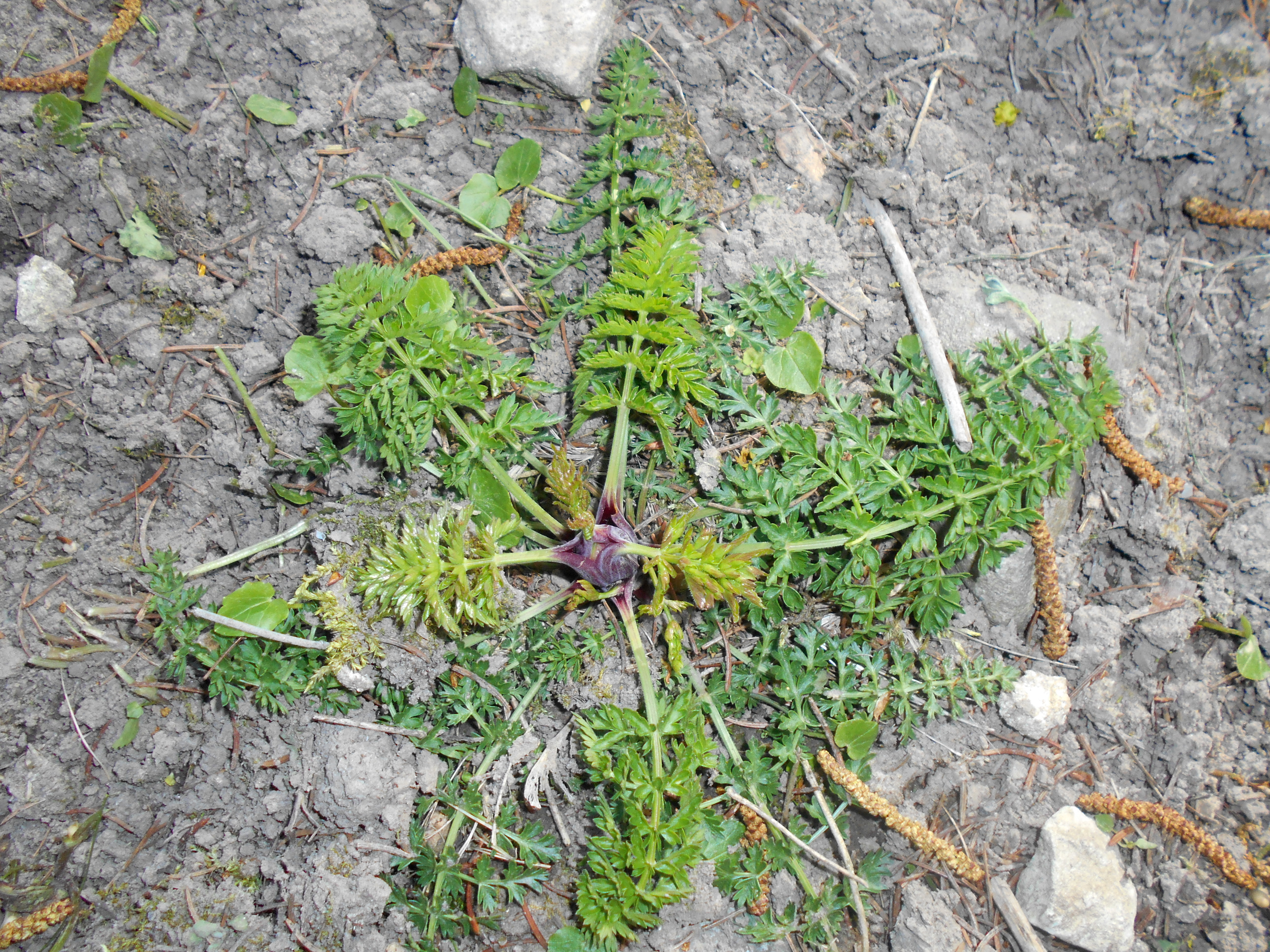 Marchwica pospolita (Ligusticum mutellina), Ogród Botaniczny UMCS w Lublinie